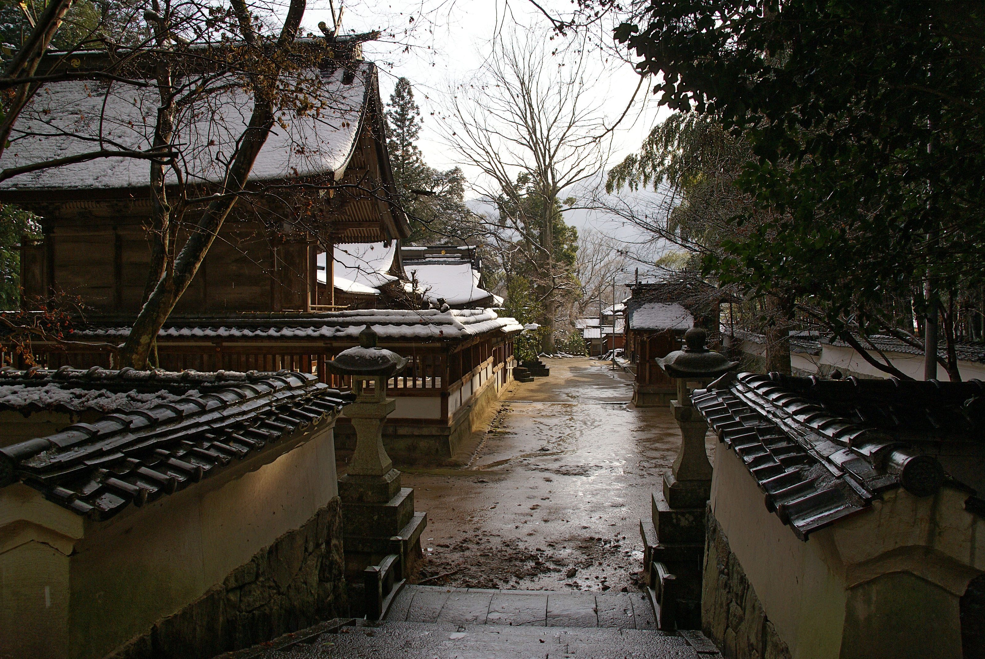 Hyozu-jinja in Tamba, Hyogo, Japan